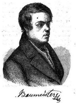 Johann Wilhelm Baumeister (1804-1846, in: G. W. Schrader/Eduard Hering: Biographisches-literarisches Lexicon der Thierärzte aller Zeiten und Länder, Stuttgart 1863, S. 28)